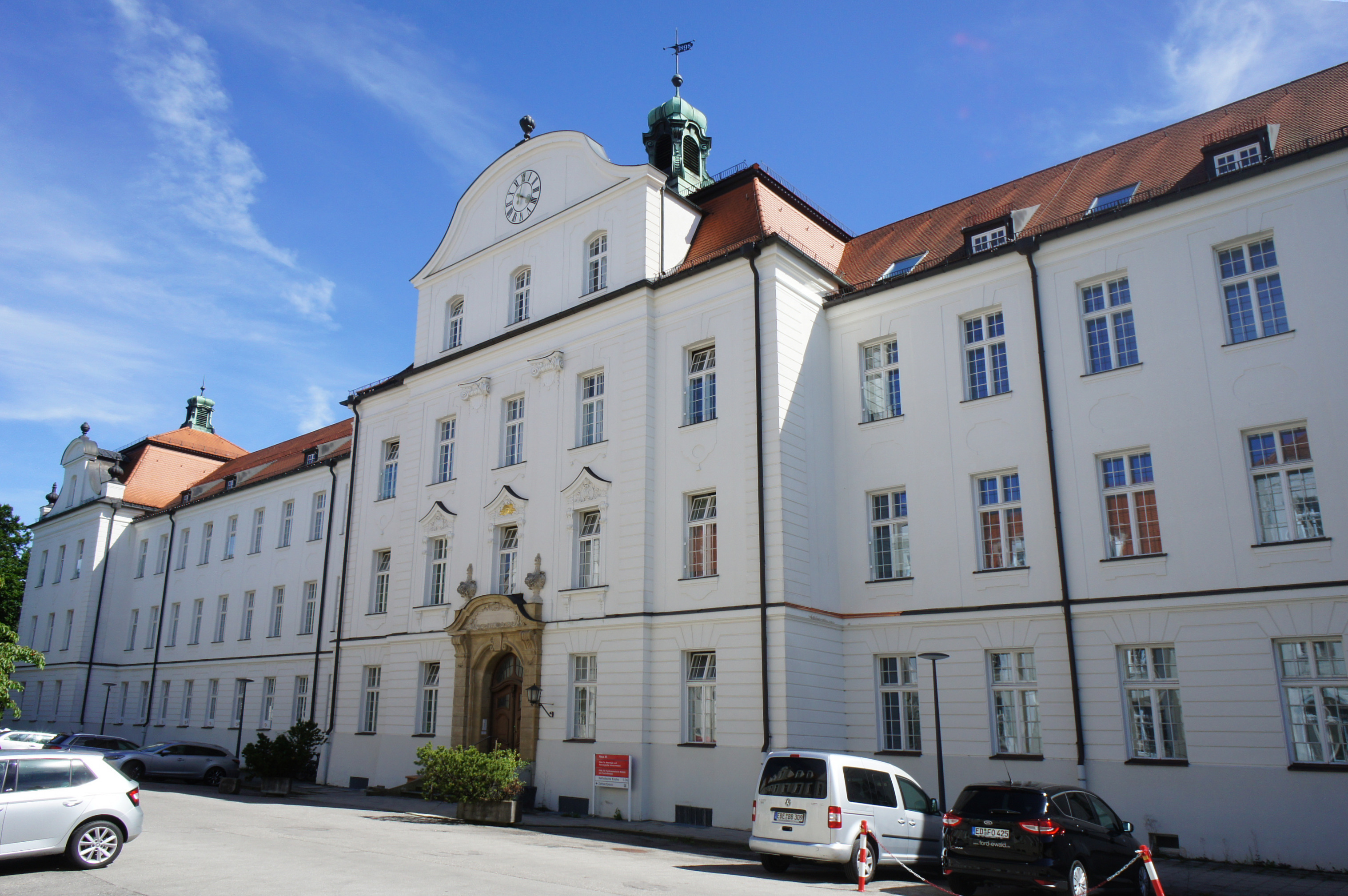 Klinikum Harlaching. Nordfront von von Gebäude A1.